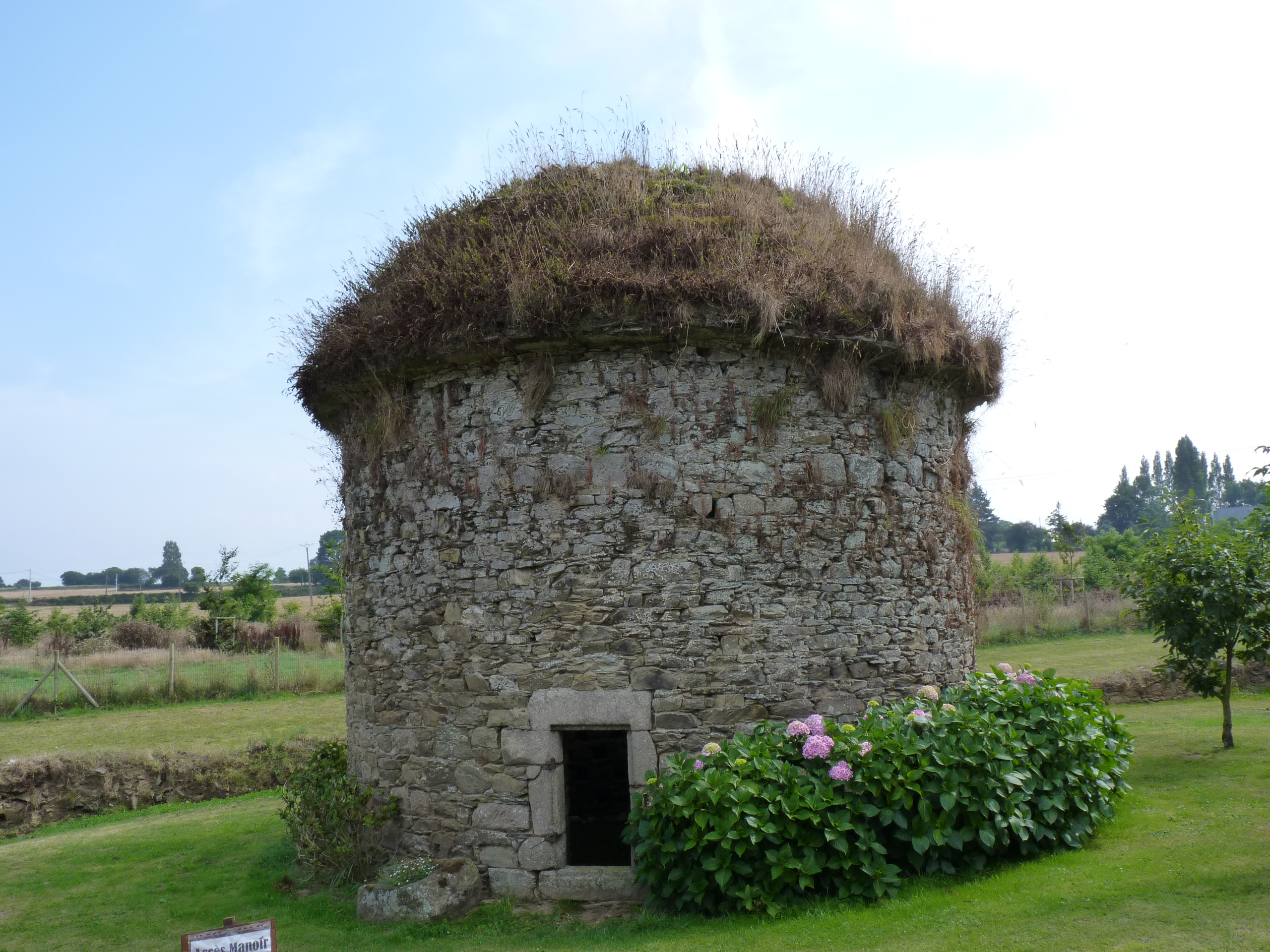 Manoir du 14ème siècle en cours de restauration. Pigeonnier.